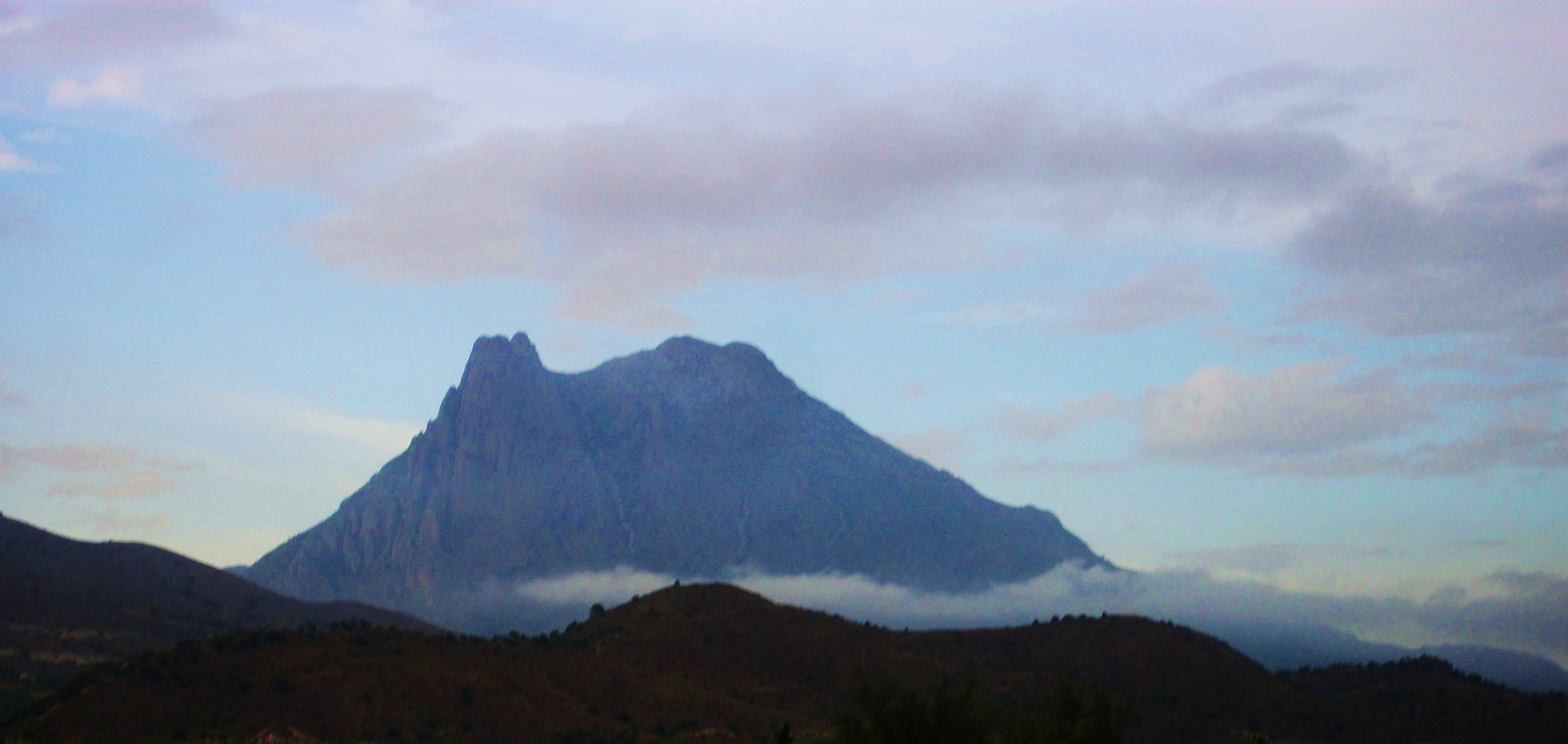 La muntanya del Puig Campana. Foto feta des del cotxe anant per l'autopista...